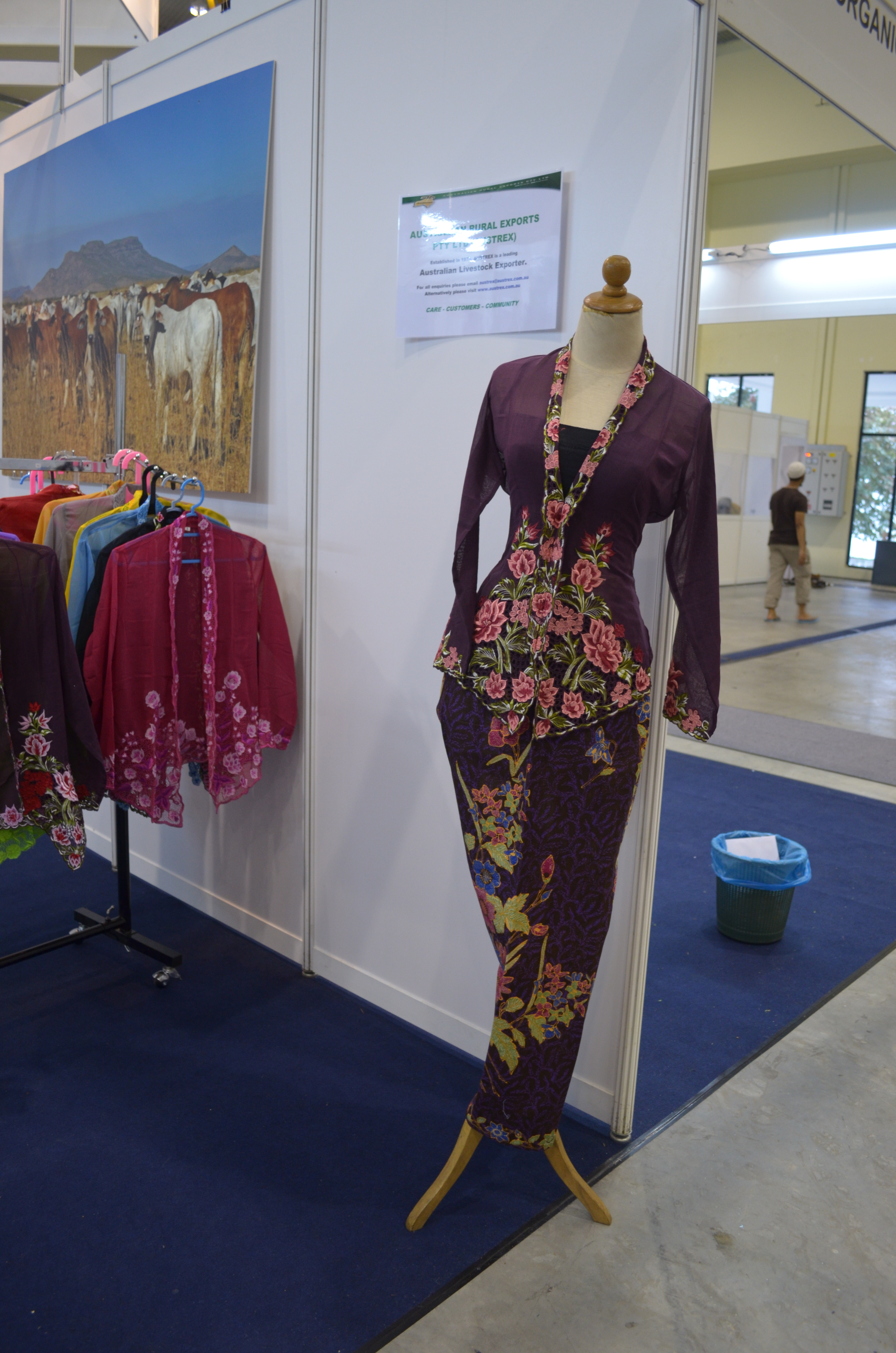 Hiasan baju kebaya.